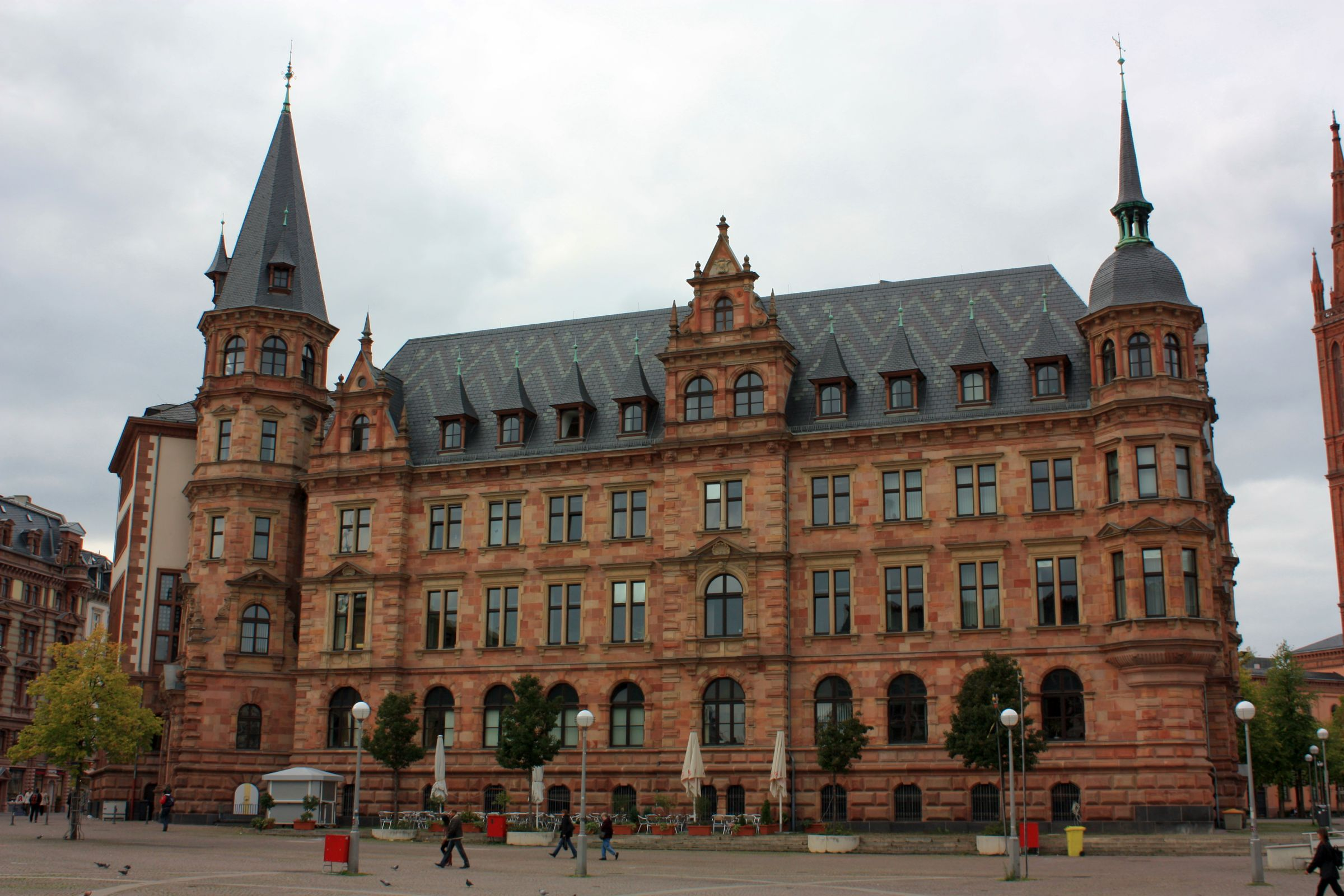 Neues Rathaus von Wiesbaden, Hessen